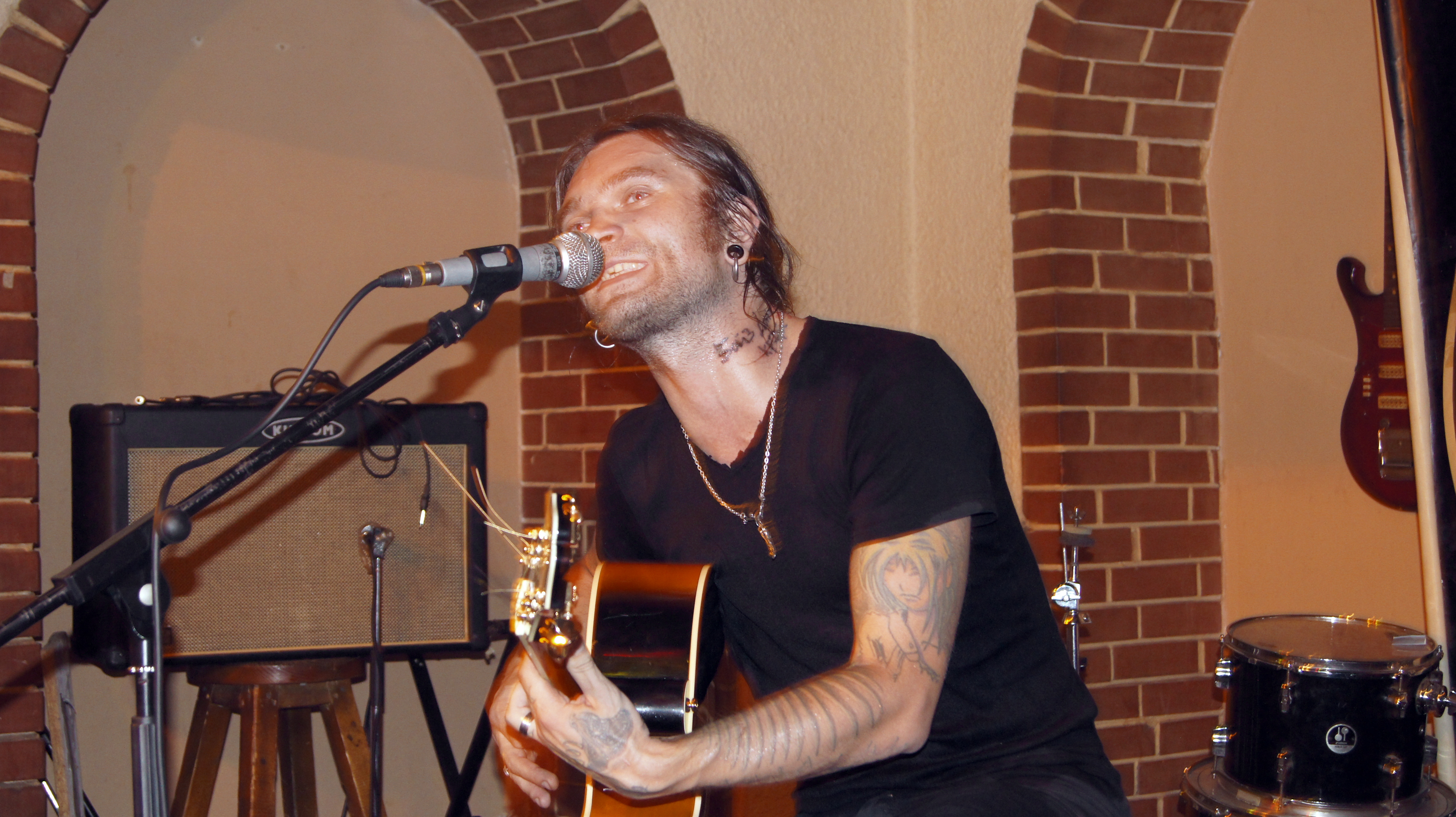 Выступление солиста группы Психея в Самаре в рок баре Подвал в 2011 году